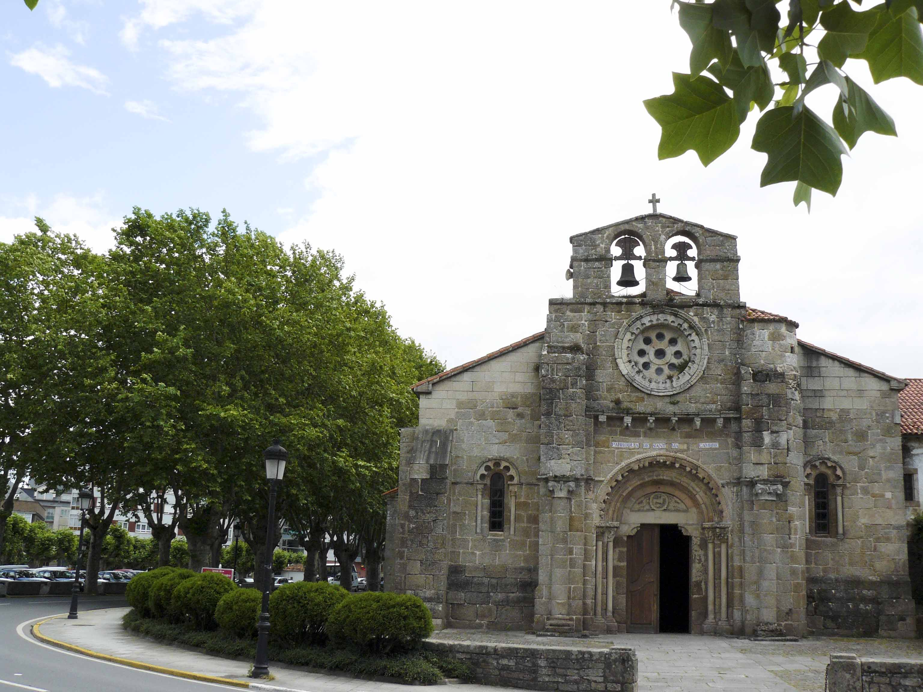 Fachada Igrexa de Santa María de Cambre